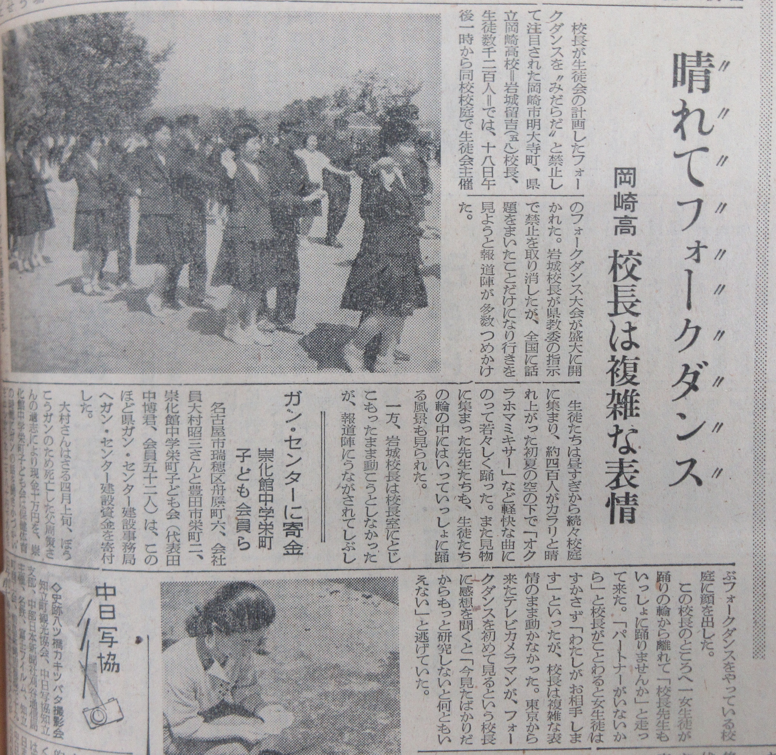 愛知県立岡崎高等学校で起こった「フォークダンス事件」を報じる『中部日本新聞』の記事。1963年5月19日。